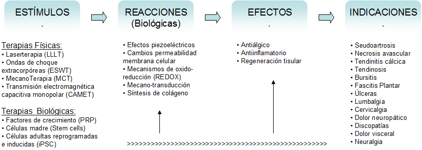 Esquema sobre el proceso de la BioFisioTerapia, desde los estímulos iniciales a las reacciones que se generan y los defectos que se derivan, con los resultados finales que se obtienen.